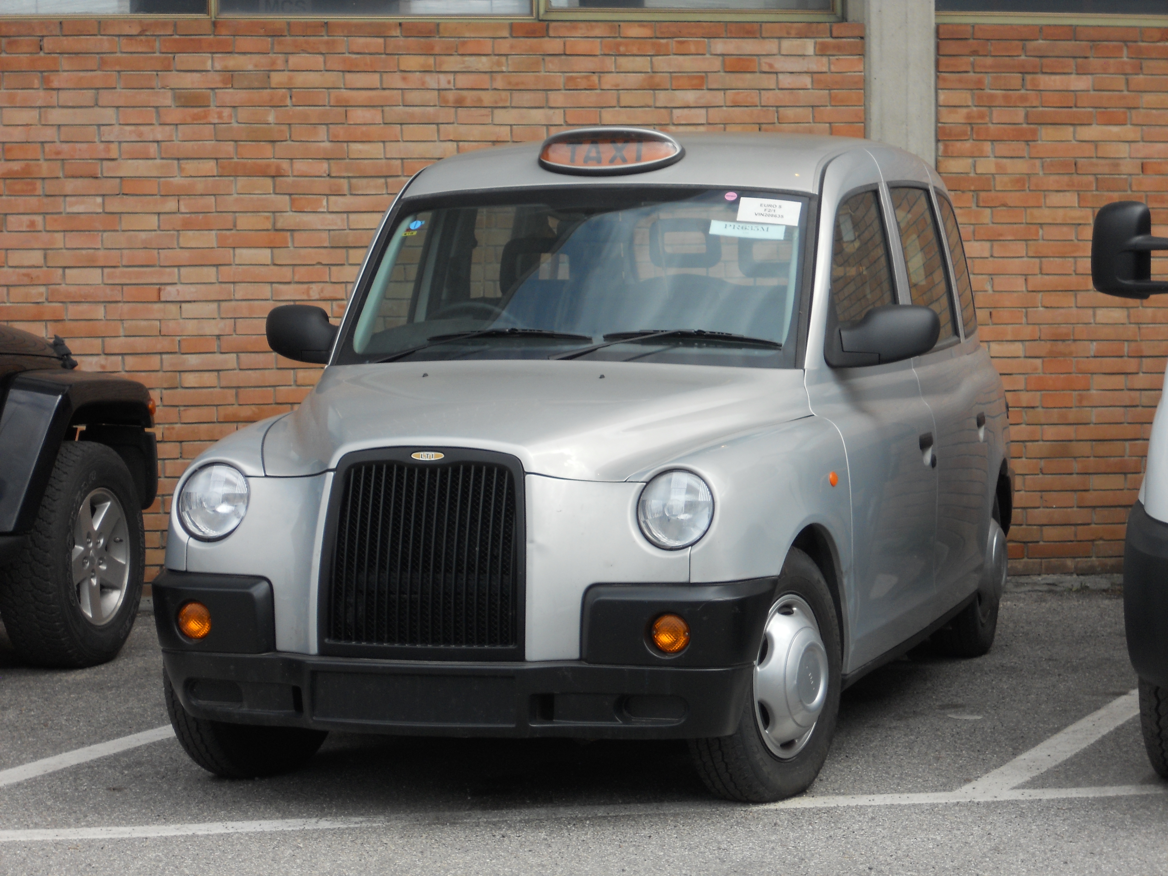 Un TAXI AUSTIN alla VM Motori durante un collaudo